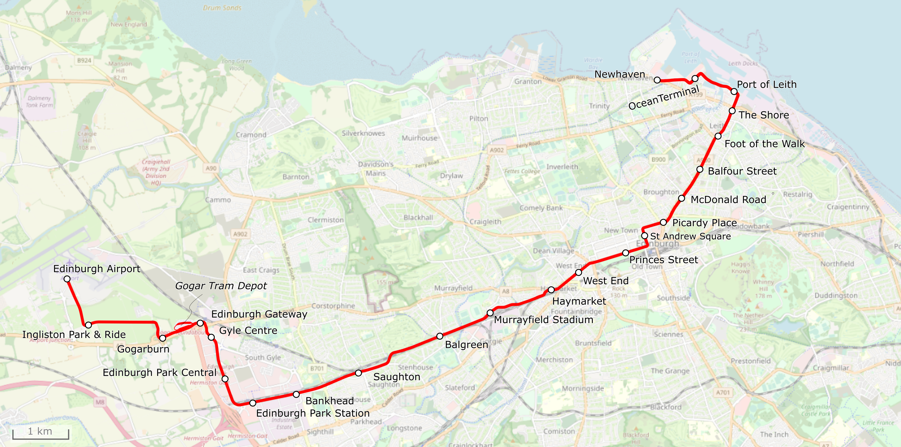 Lagekarte der Edinburgh Trams